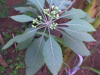 Fotografia de um boldo baiano cultivado em minha propriedade.